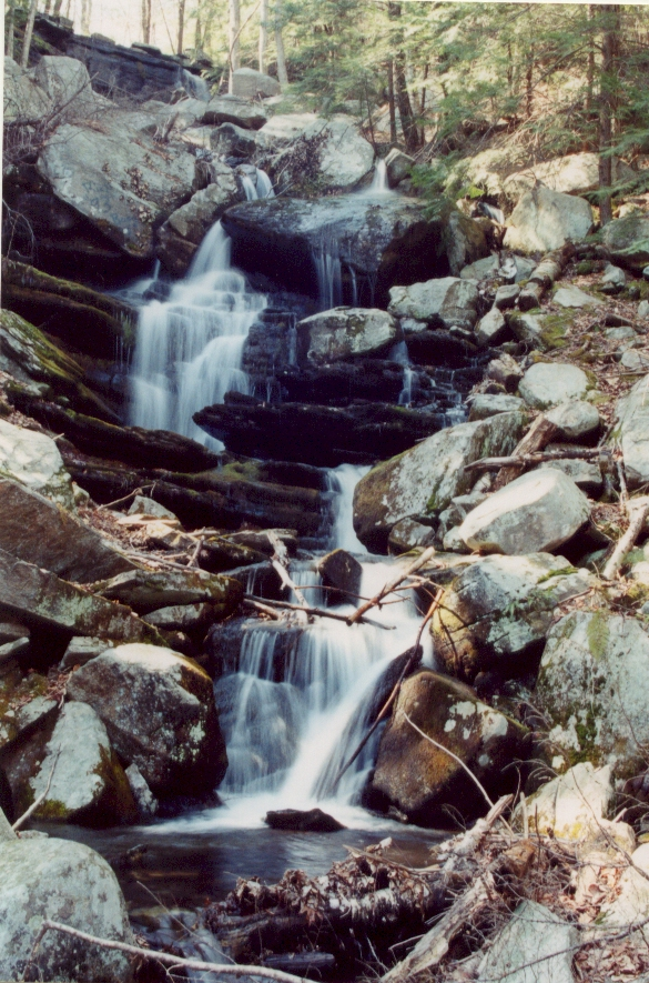 Briggs Brook Falls; Erving, Massachusetts